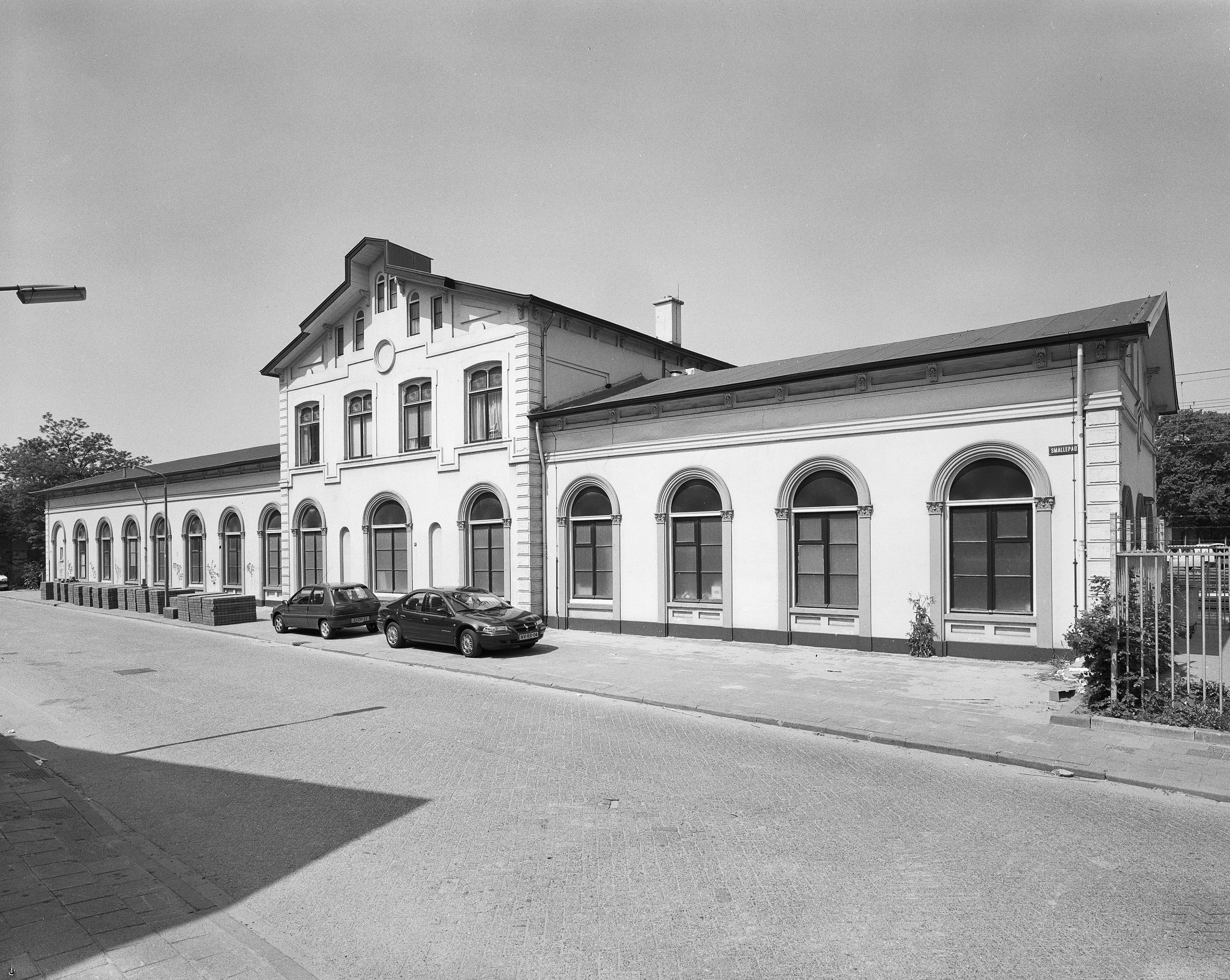 Station (Oude- Of Eerste): Exterieur VOORGEVEL